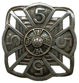 5 Pułk Piechoty Legionów